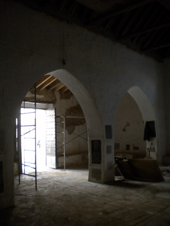 Nave de la epístola de la ermita de San Antón del Valle de Sanlúcar de Barrameda